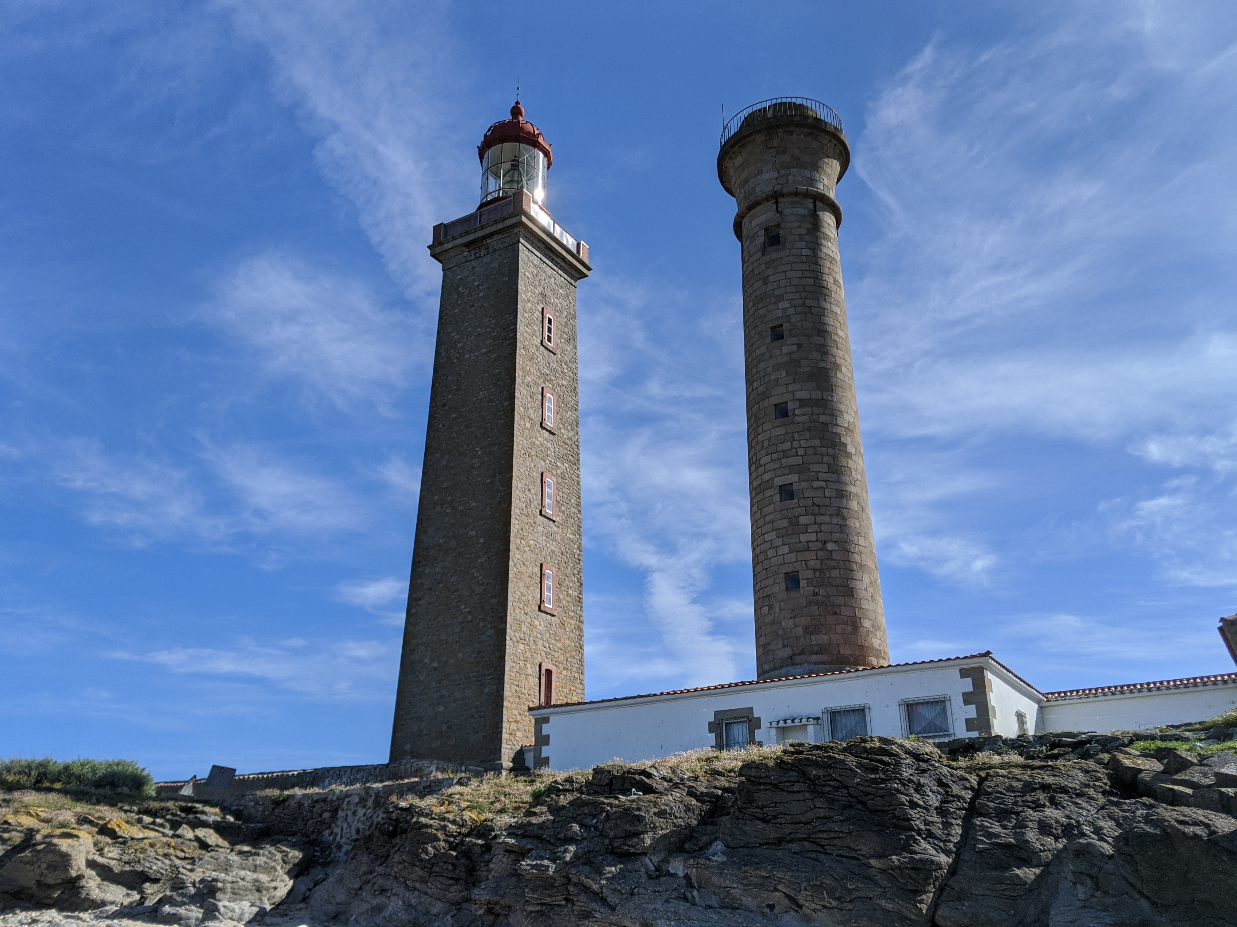 Photo des deux phares de l’île du Pilier au large de l’île de Noirmoutier en Vendée.